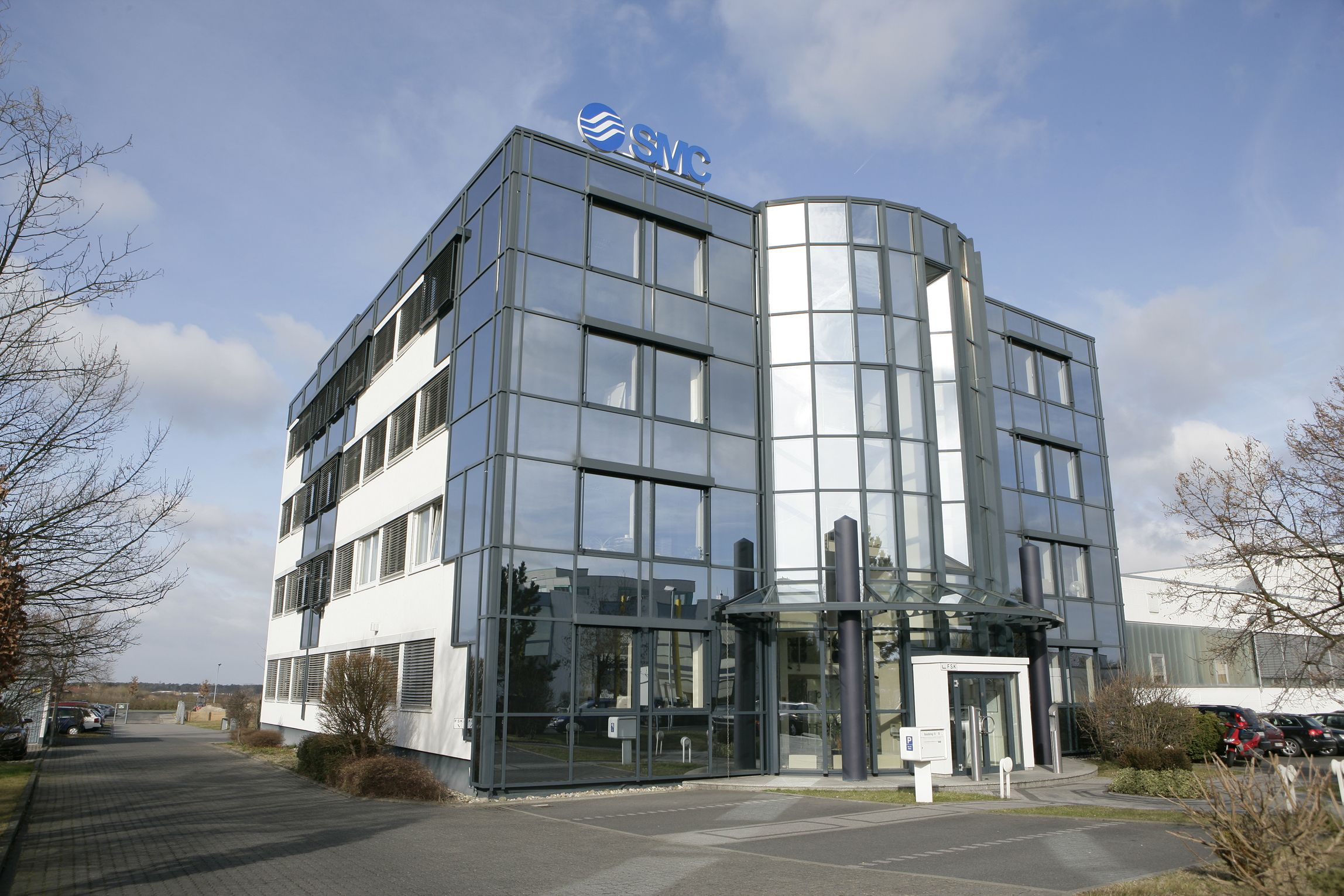 Headquarter SMC Deutschland in Egelsbach